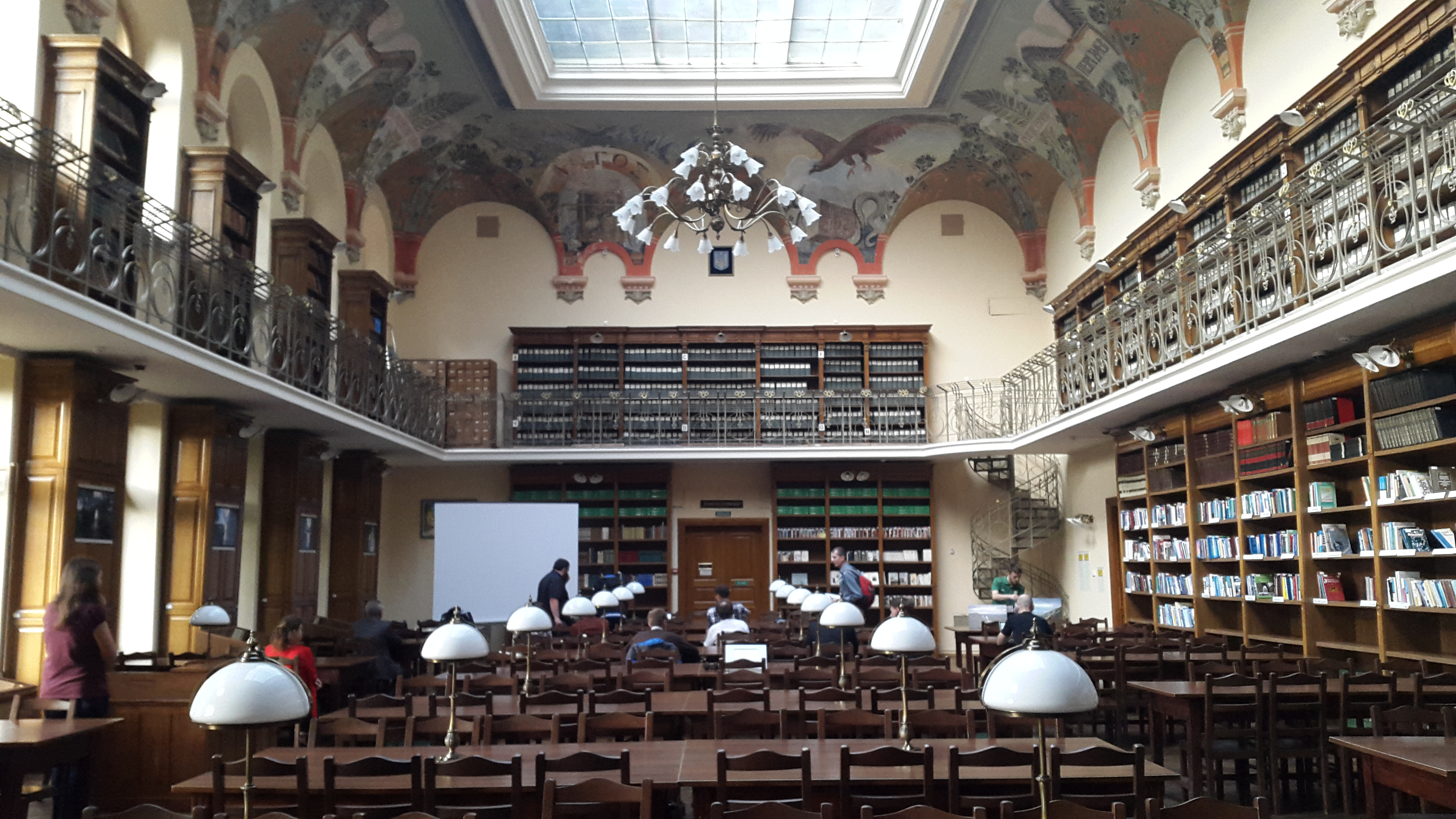 Будинок наукової бібліотеки університету, де працював Франко І. Я., Львів, Драгоманова М., 5